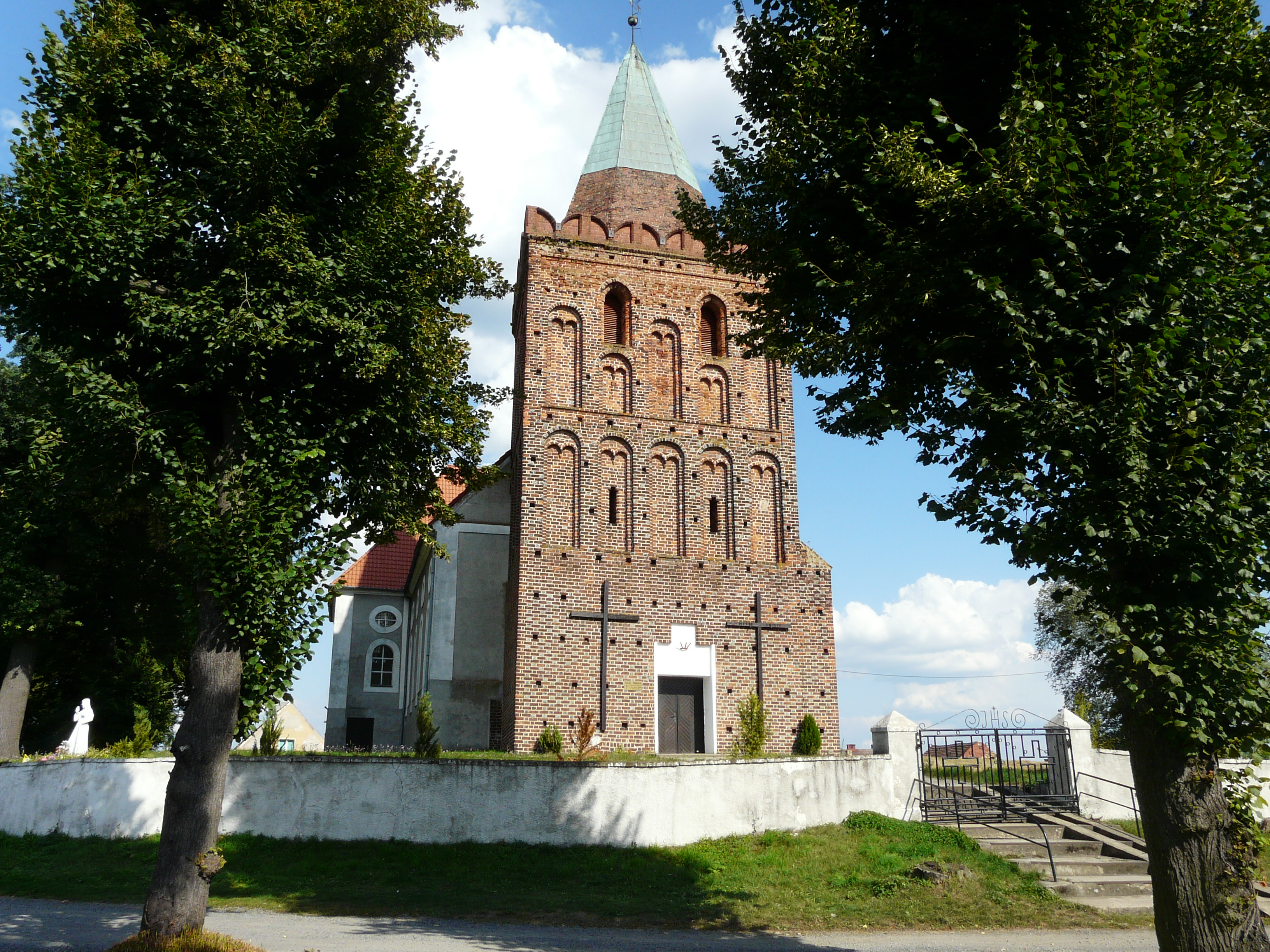 Starosiedle, kościół ewangelicki, ob. rzym.-kat. par. p.w. św. Jana od Krzyża, XVIII, wieża - XVI